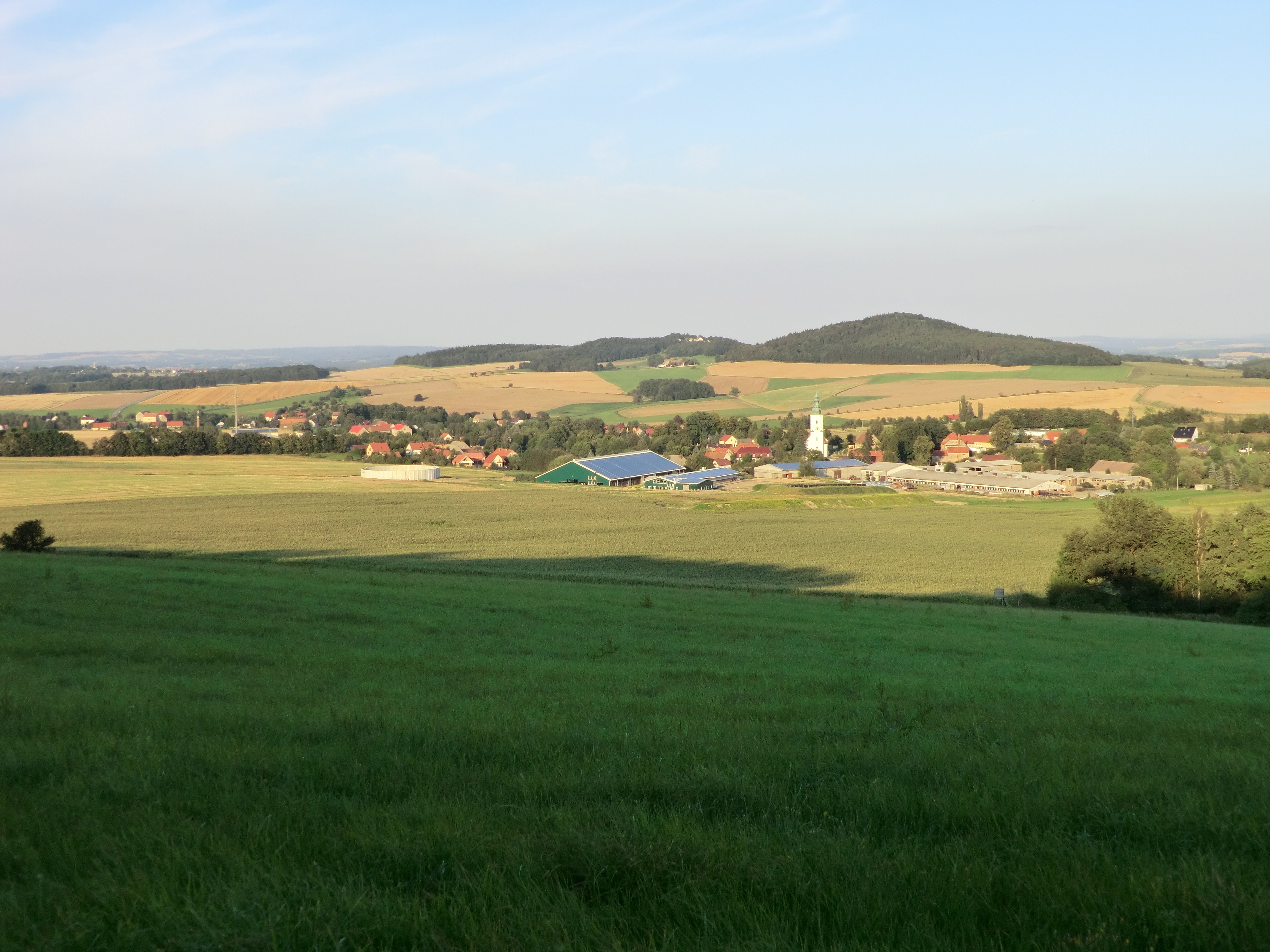 Blick von Friedersdorfer Berg auf Friedersdorf (Markersdorf) in Richtung Schwarzer Berg (Jauernick Buschbach)